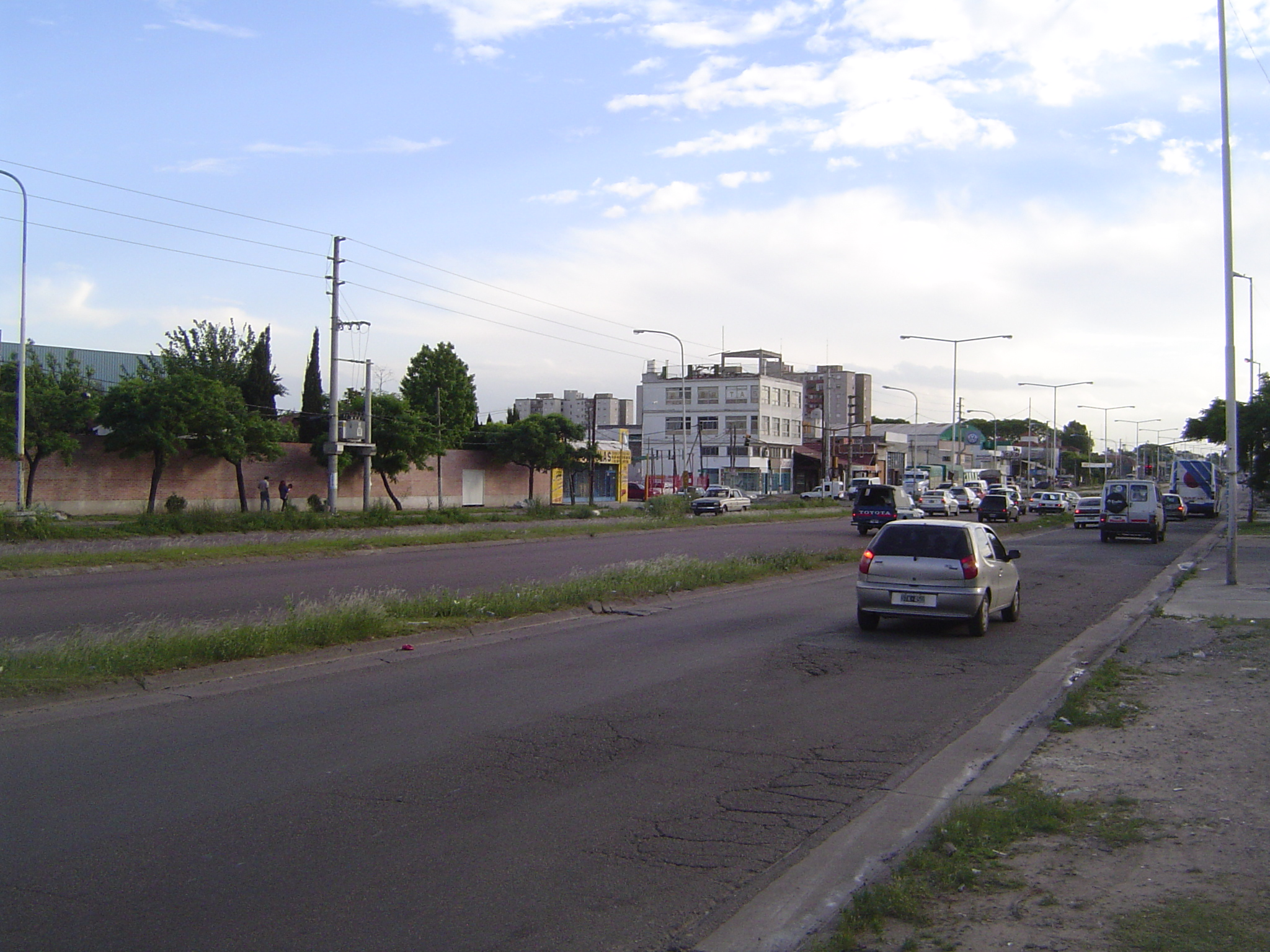 Ruta Provincial 4, a su paso por Loma Hermosa, Buenos Aires.